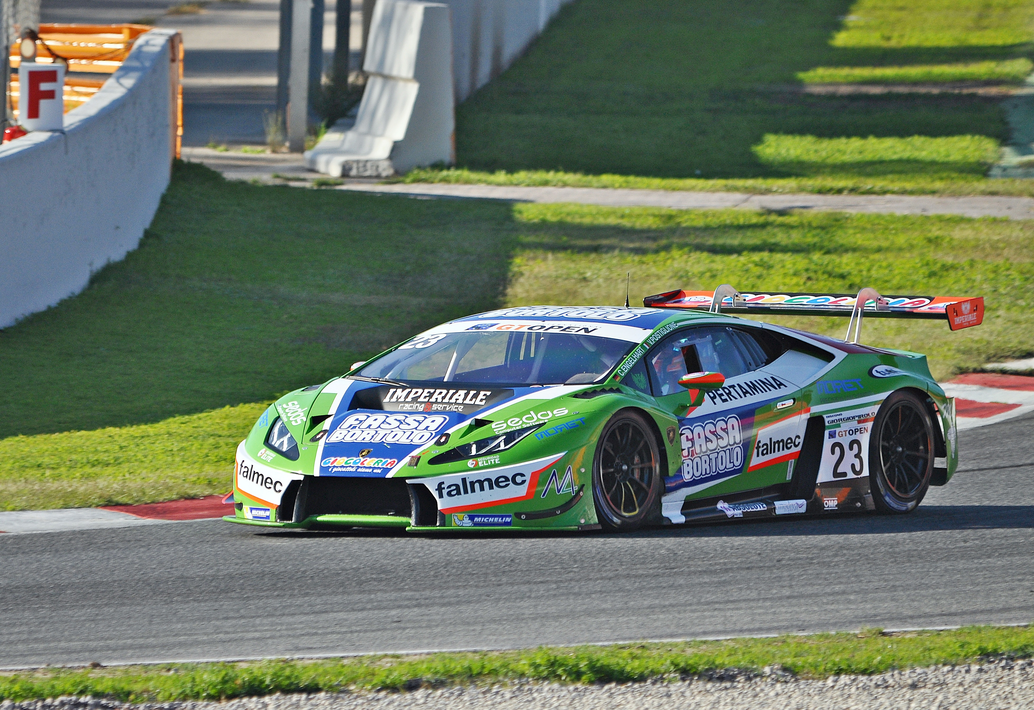 Circuito de Barcelona 2017